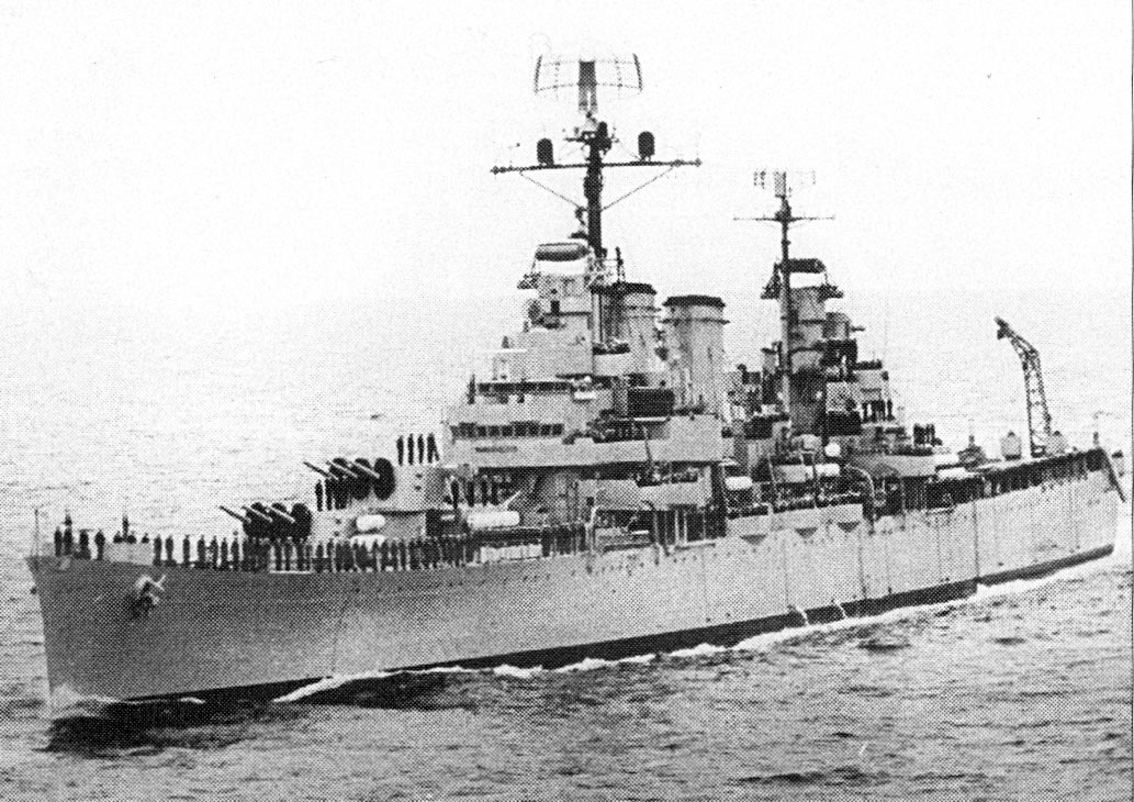 ARA General Belgrano underway